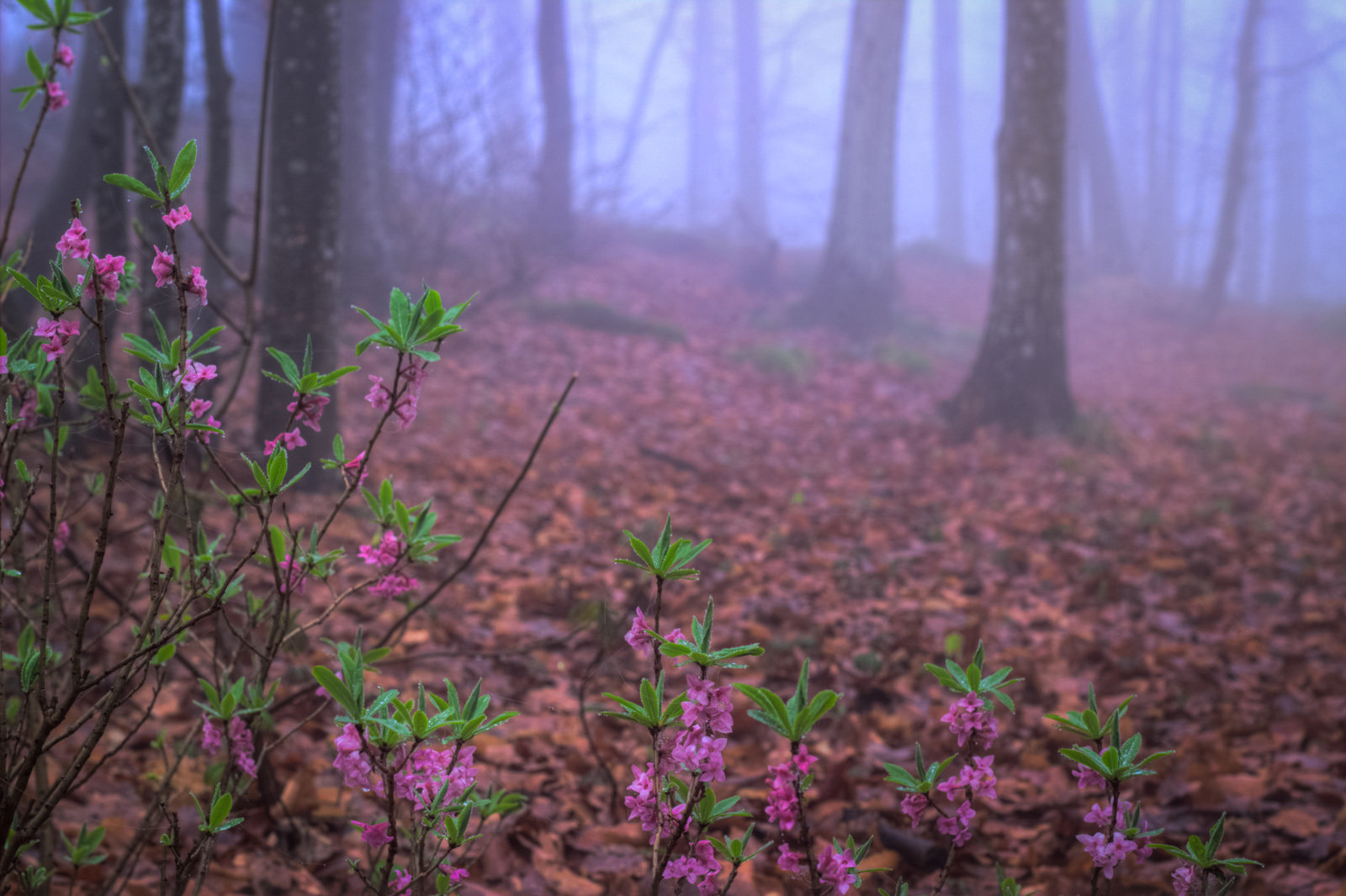 Si chiama Daphne cneorum, profumatissima e velenosa! La Daphne cneorum (in volgare cneoro) è una pianta velenosa sempreverde, a portamento arbustivo, con rami prostrato-ascendenti lunghi fino a 40 cm e i cui cespugli possono misurare fino a 20-25 centimetri di altezza, ha foglie coriacee lucide sulla pagina superiore e glabre su quella inferiore. wiki